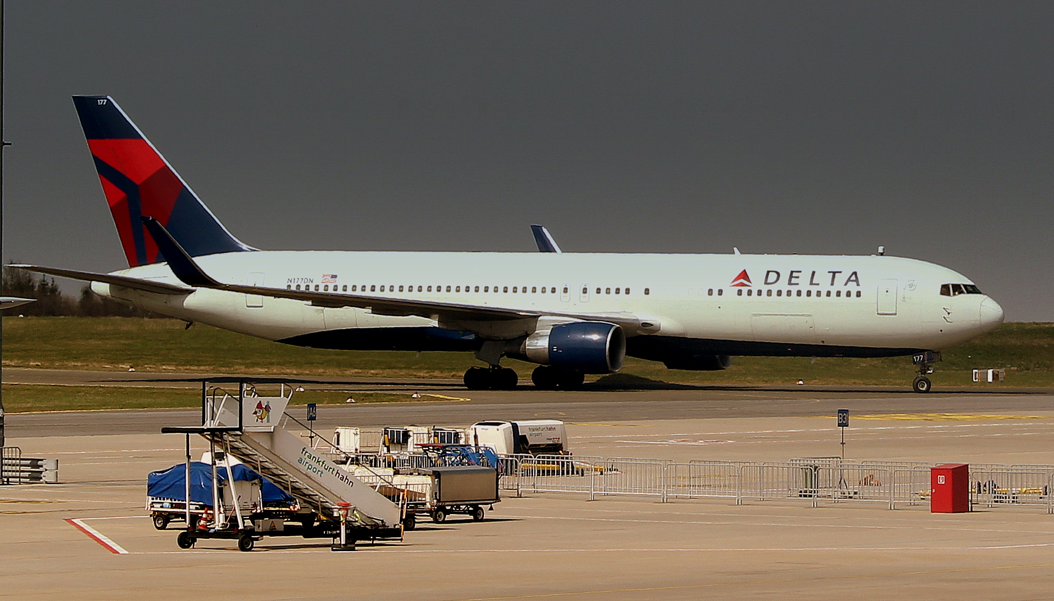 DELTA AIRLINES BOEING 767-300 AT FRANKFURT HAHN FLUGHAFEN GERMANY APRIL 2013